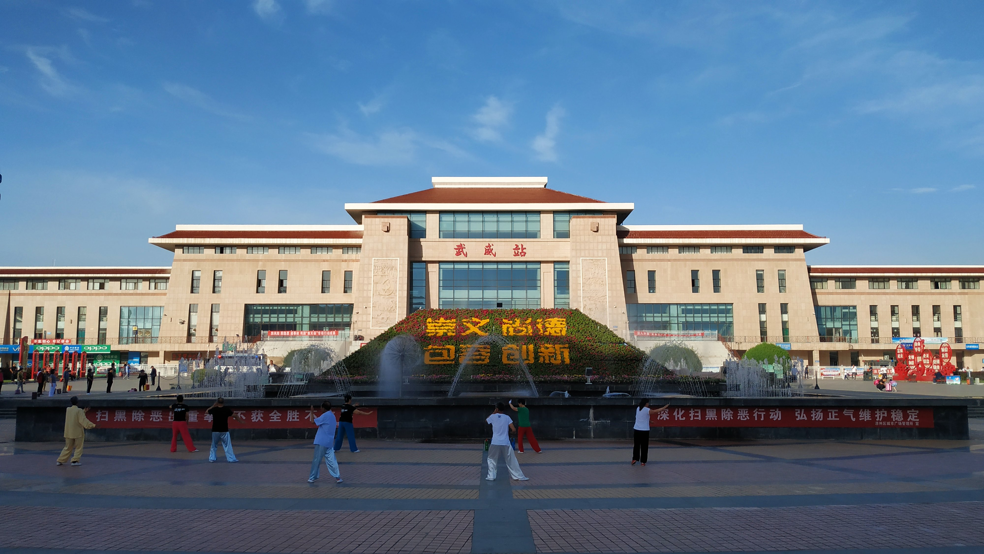 中文（中国大陆）: 武威站站房